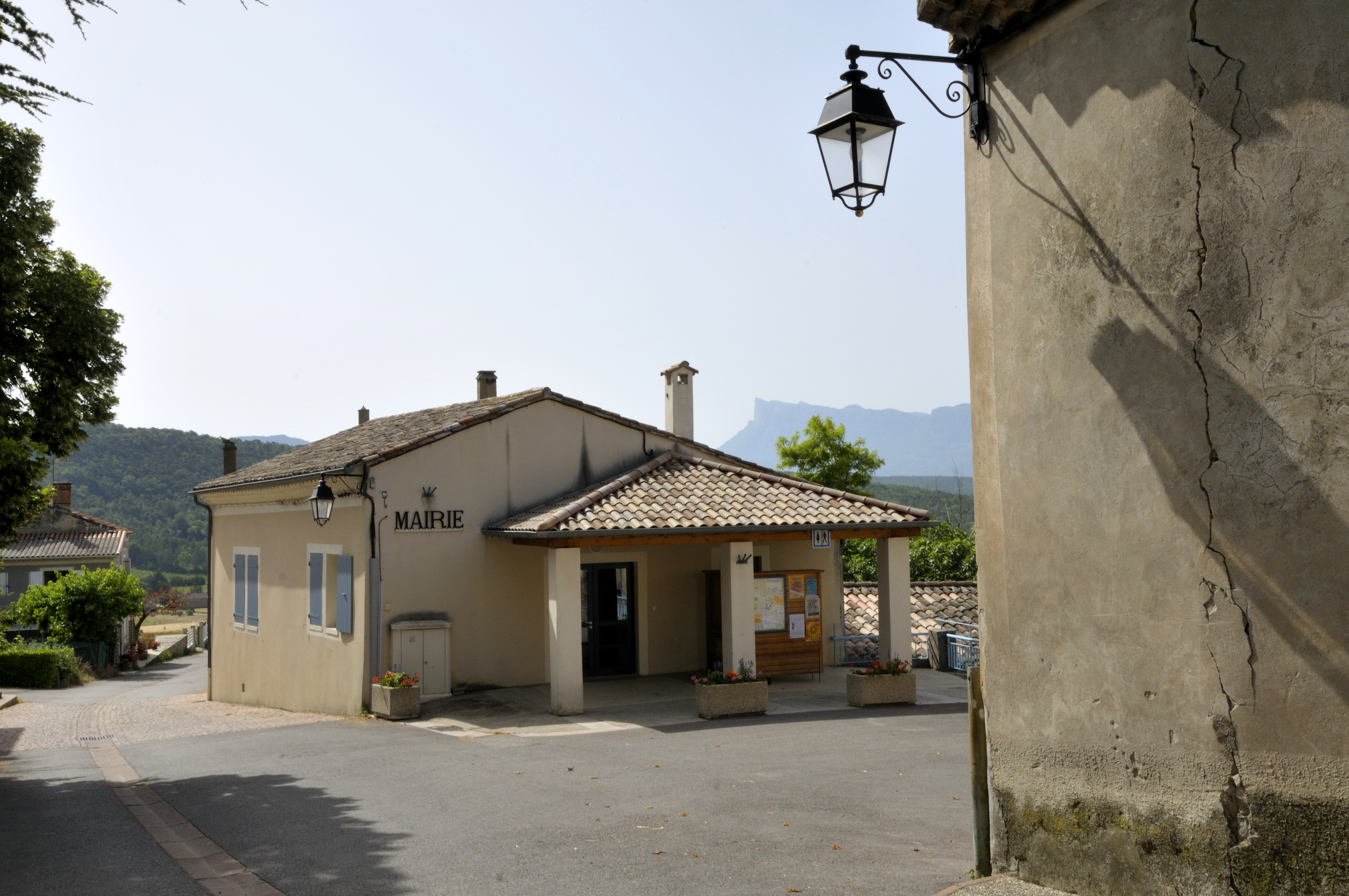 mairie du village